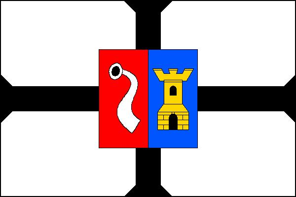 Vlajka obce Mělnické Vtelno